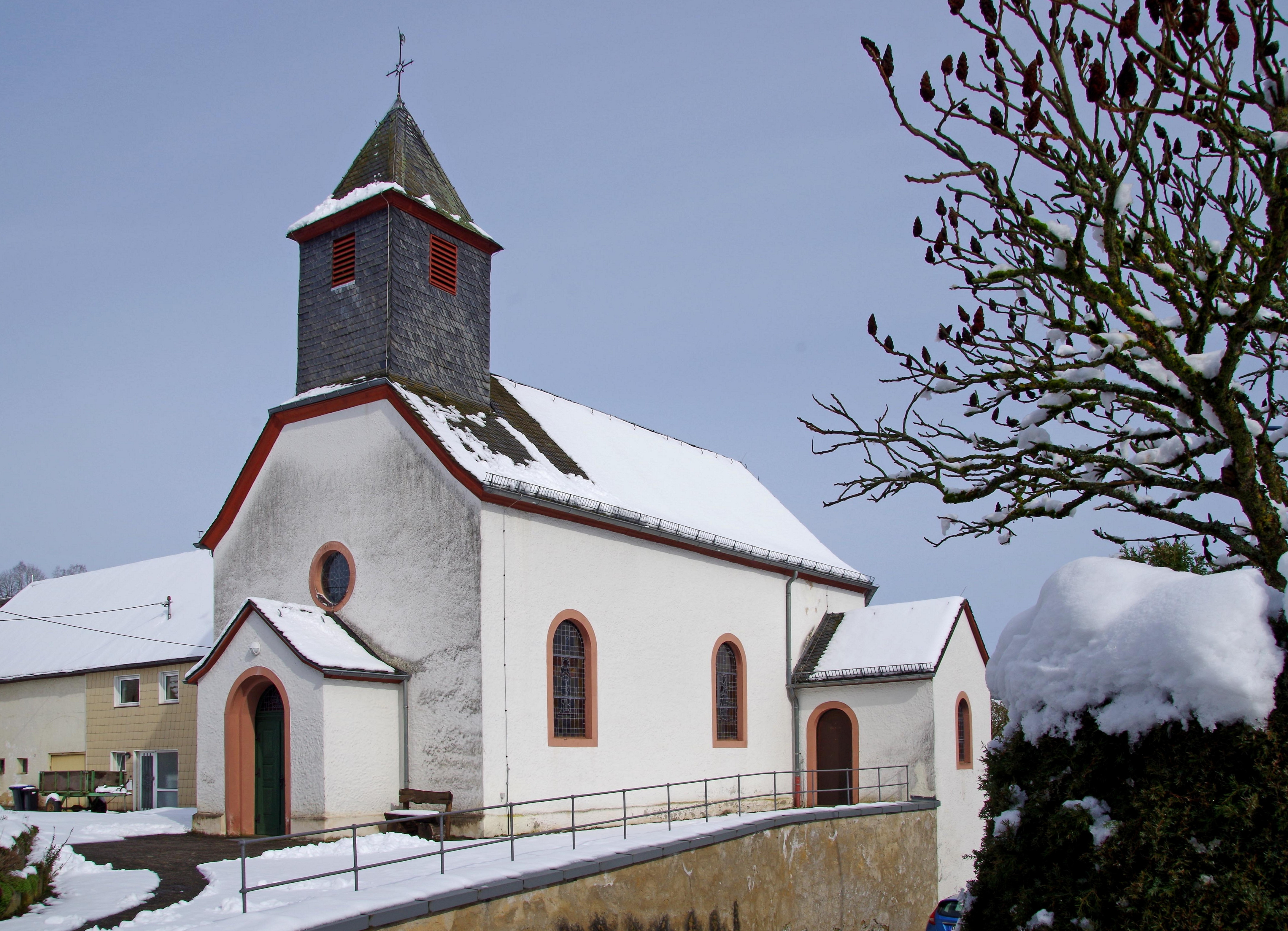 St. Luzia (Gönnersdorf)